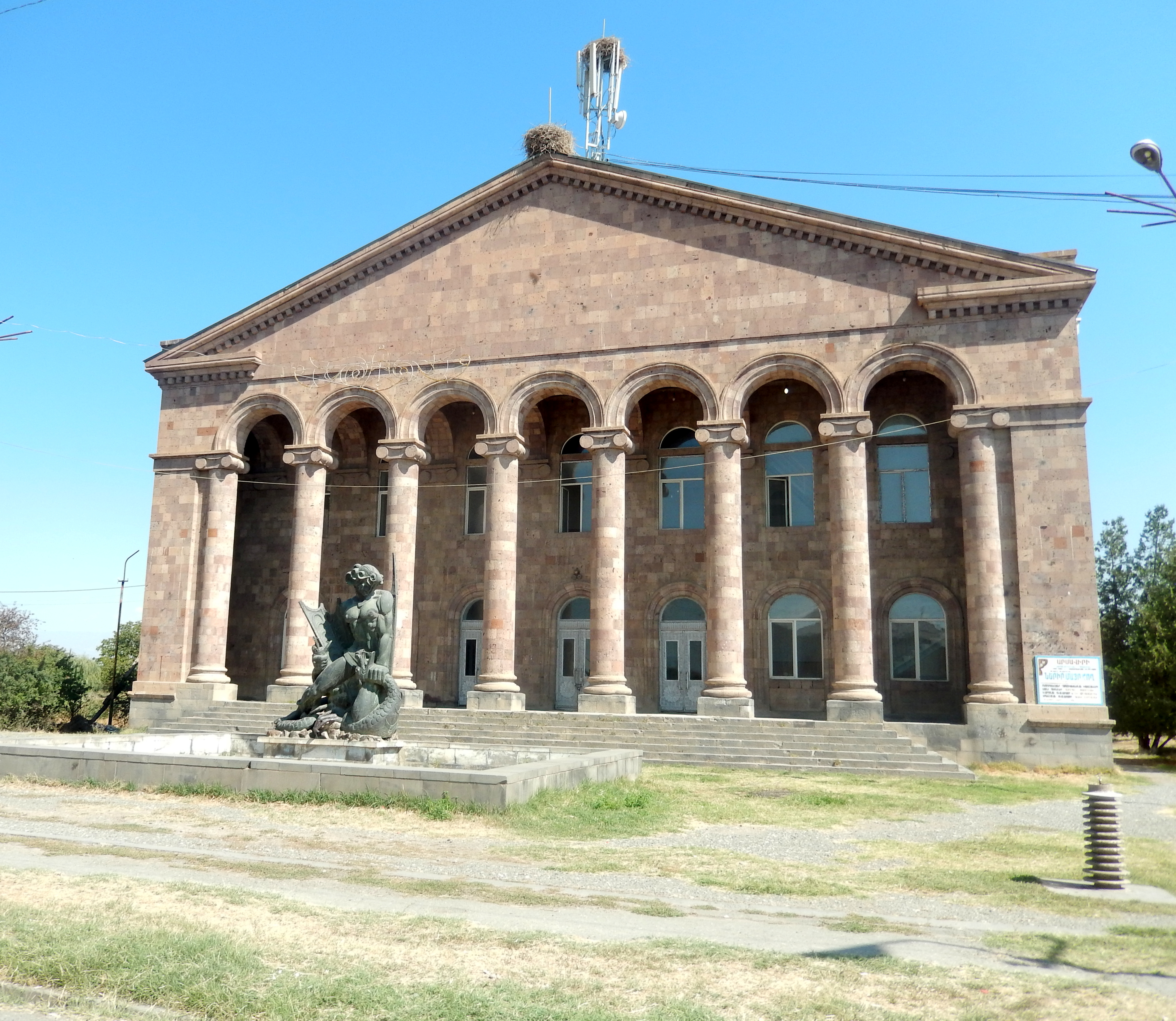 Հուշարձան` Վահագնի, գյուղ Արմավիր 20/3